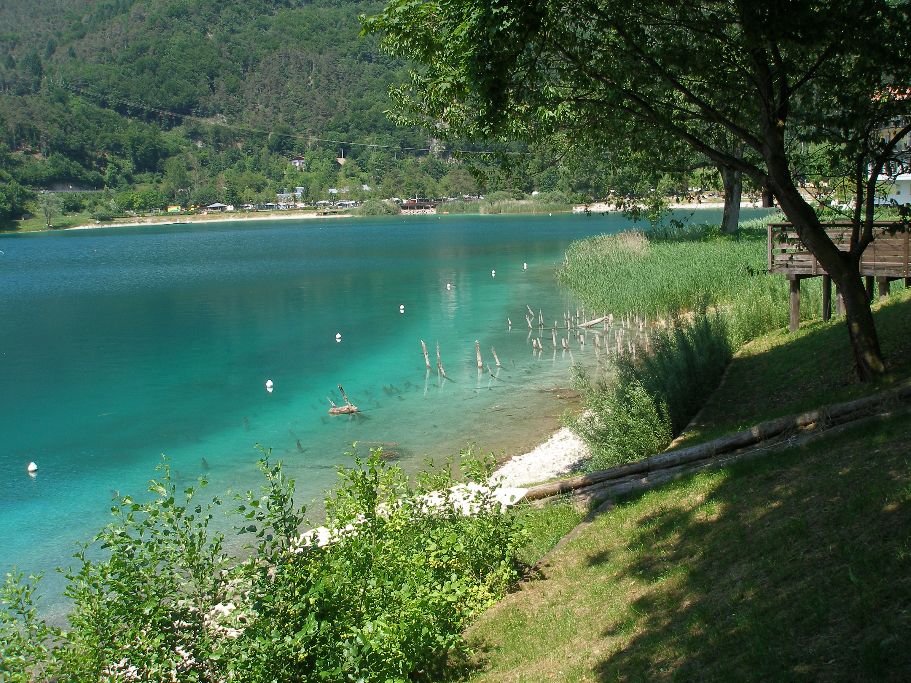 Zbytky pravěkých kůlových staveb na břehu Ledrenského jezera Unknown the residue of the prehistoric stilt houses on the bank of the lake ledro